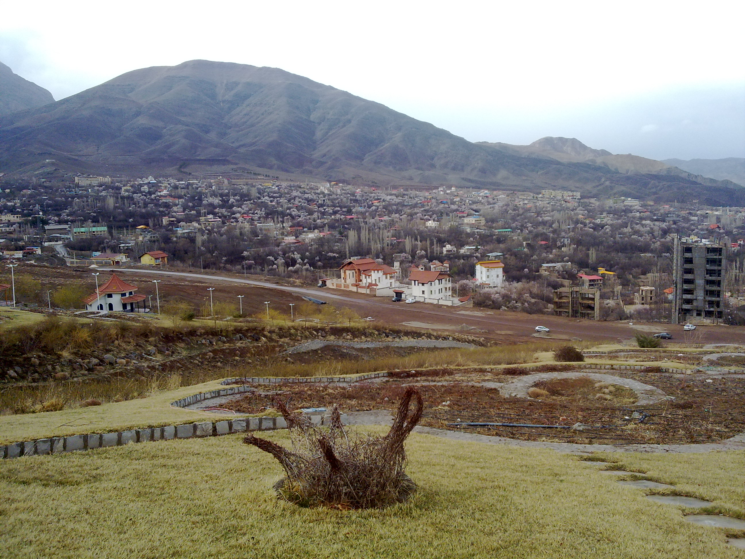 منظره ای از قمصر